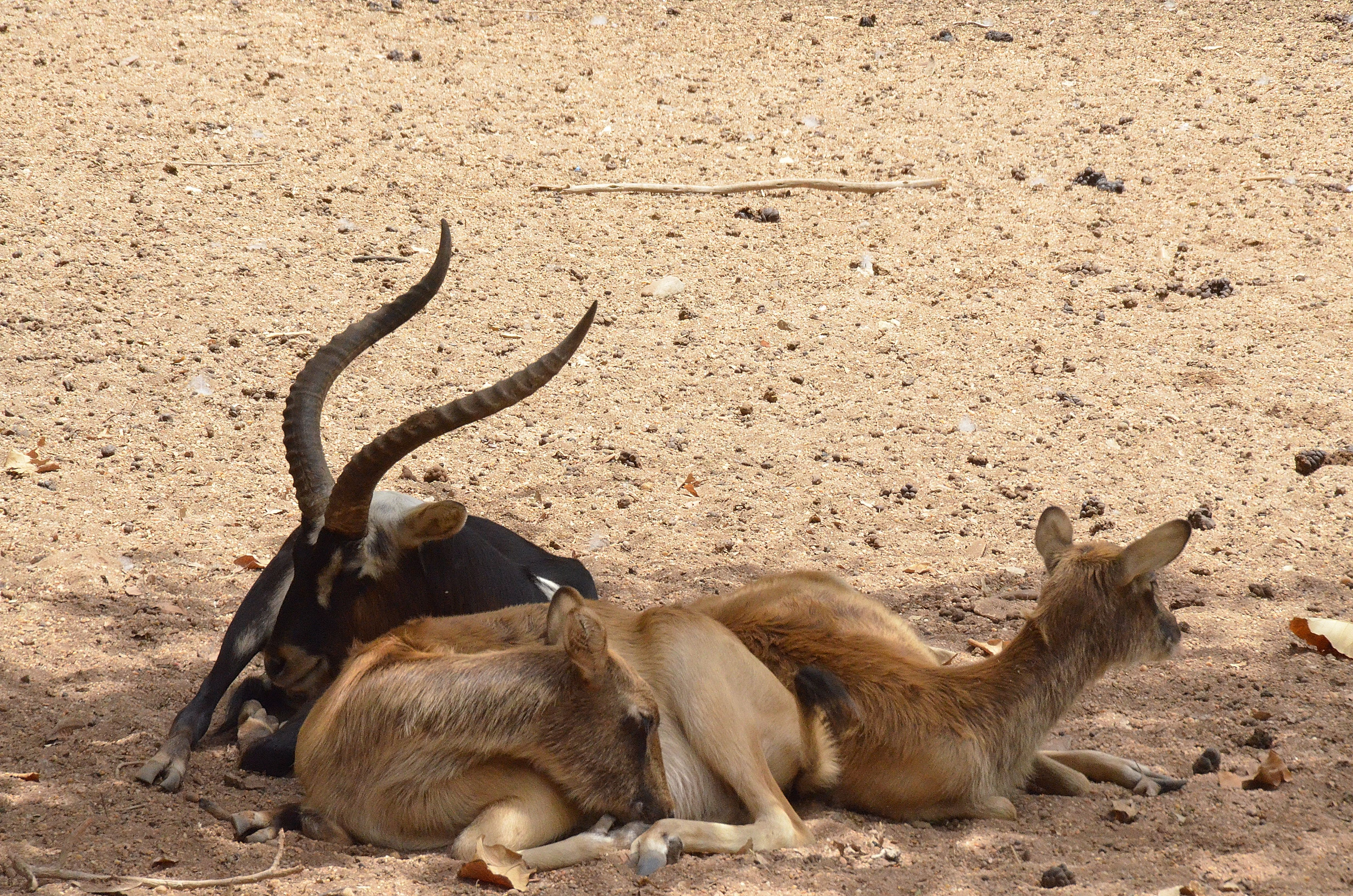 أبو عق في حديقة حيوان الجيزة